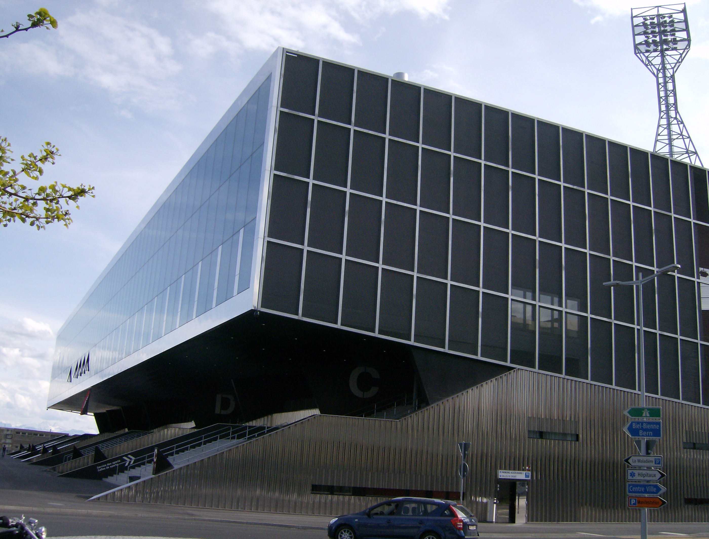 Le nouveau complexe de la Maladière, comprenant un stade de football, un centre commercial, des salles de sport et la caserne des pompiers.